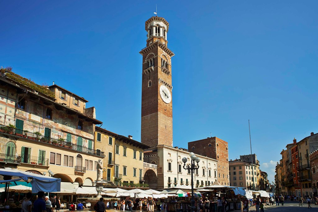 Palazzo della Ragione visto da Piazza delle Erbe a Verona